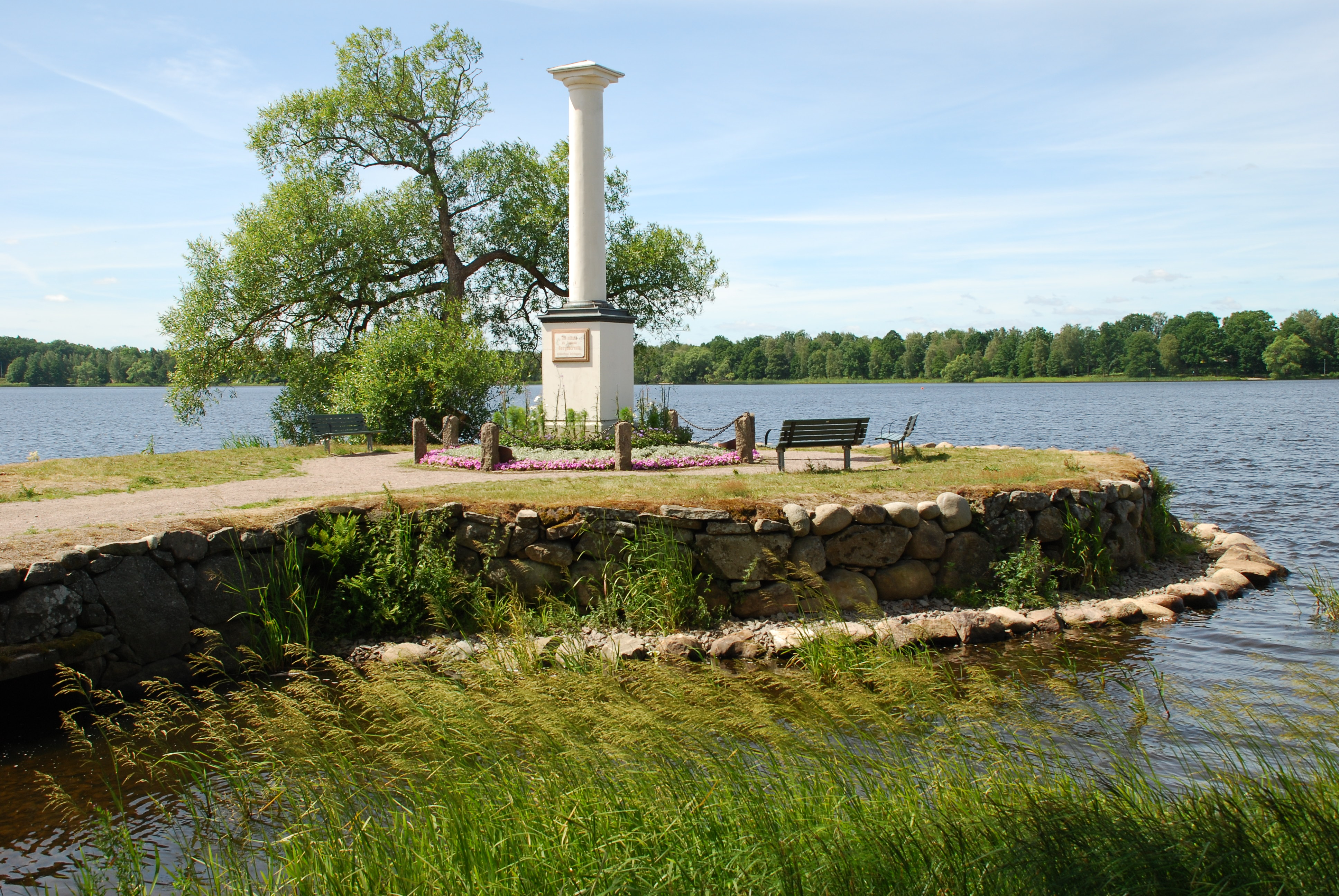 Kampens pelare vid Växjösjön